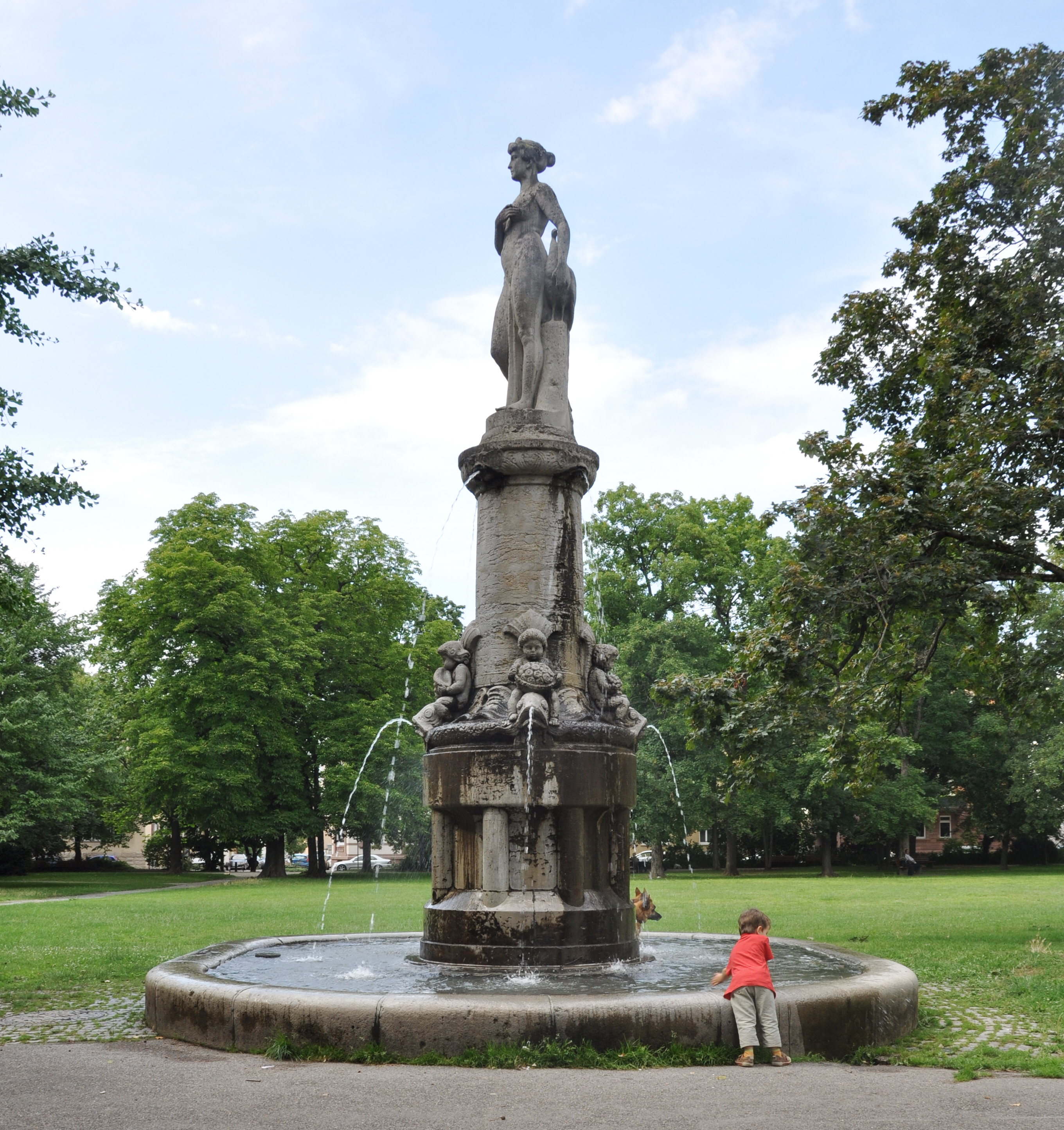 Stuttgart, Bad Canstatt, Junobrunnen im Kurpark